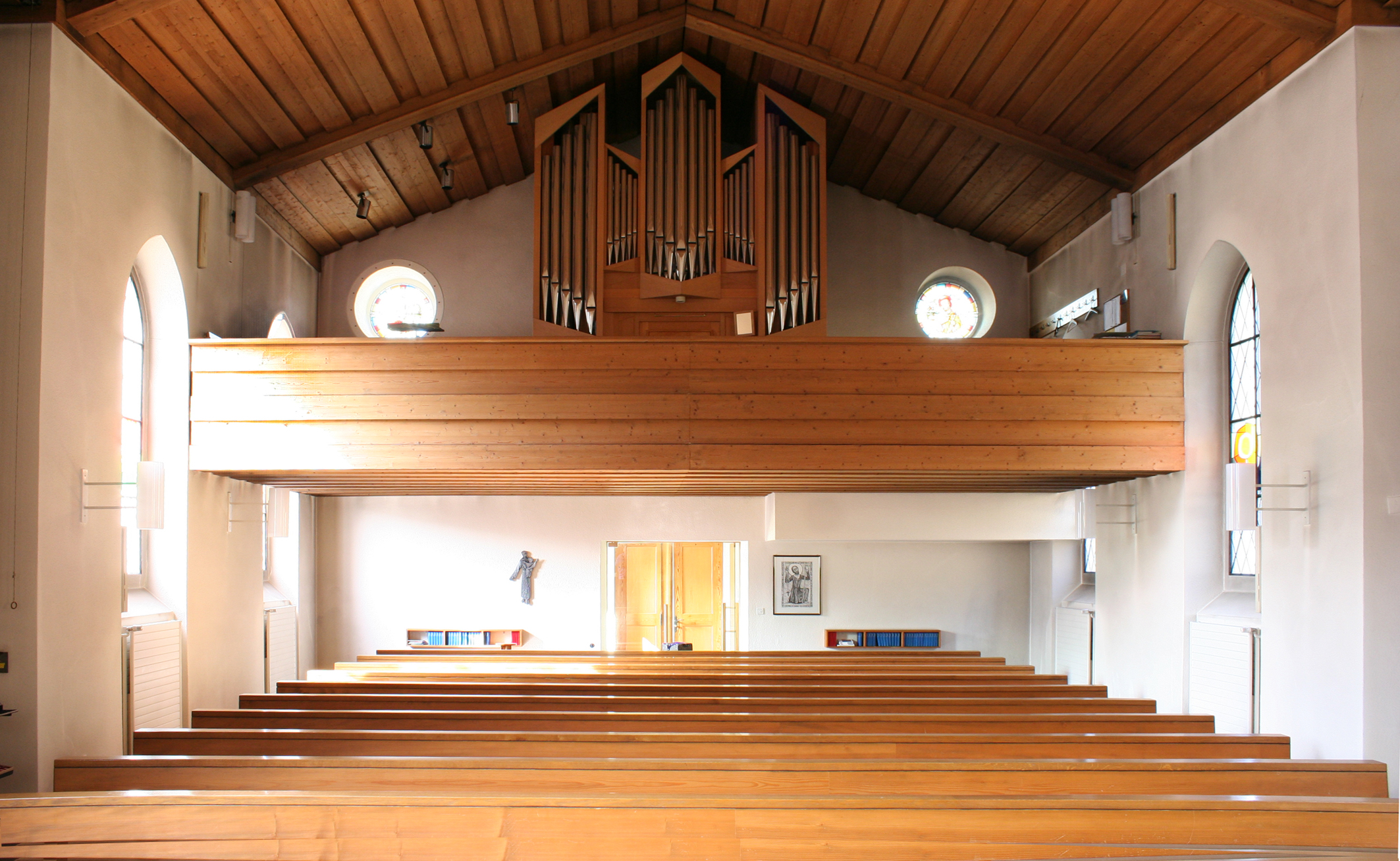 Römisch-katholische Pfarrkirche St. Antonius Kollbrunn, Ansicht von Nordwesten